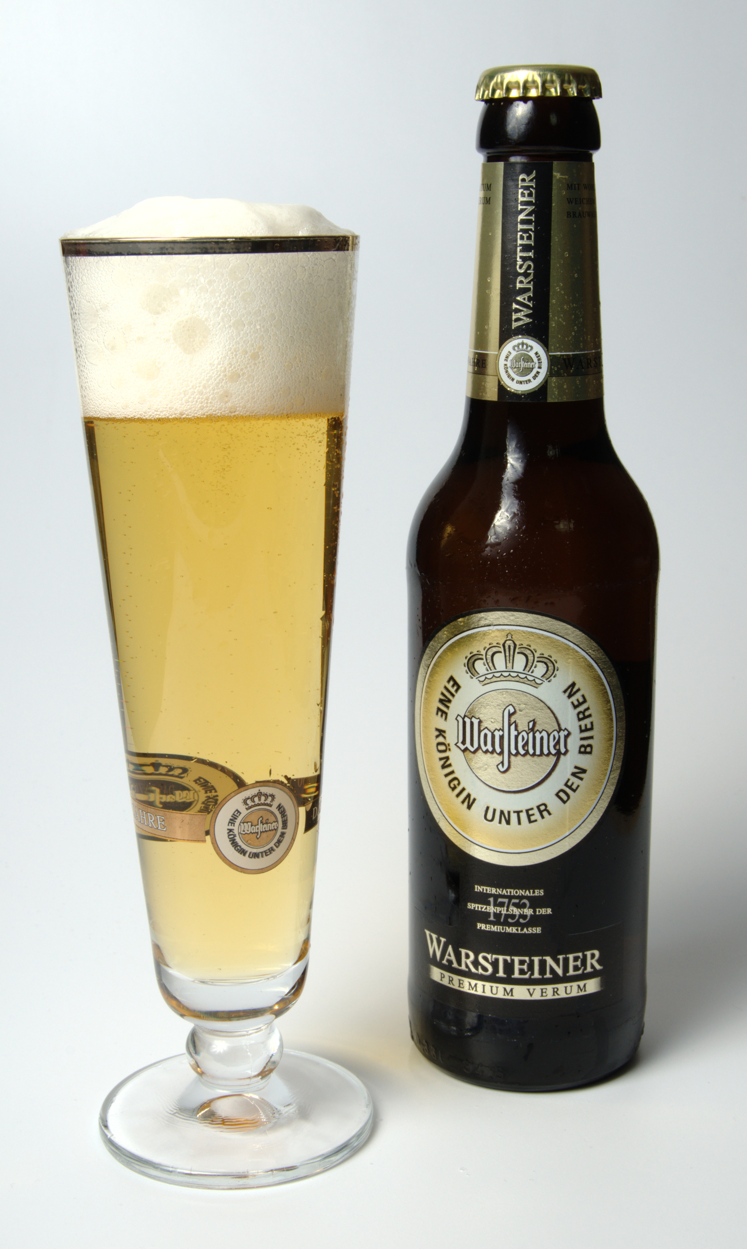 Warsteiner Premium Verum Pilsner